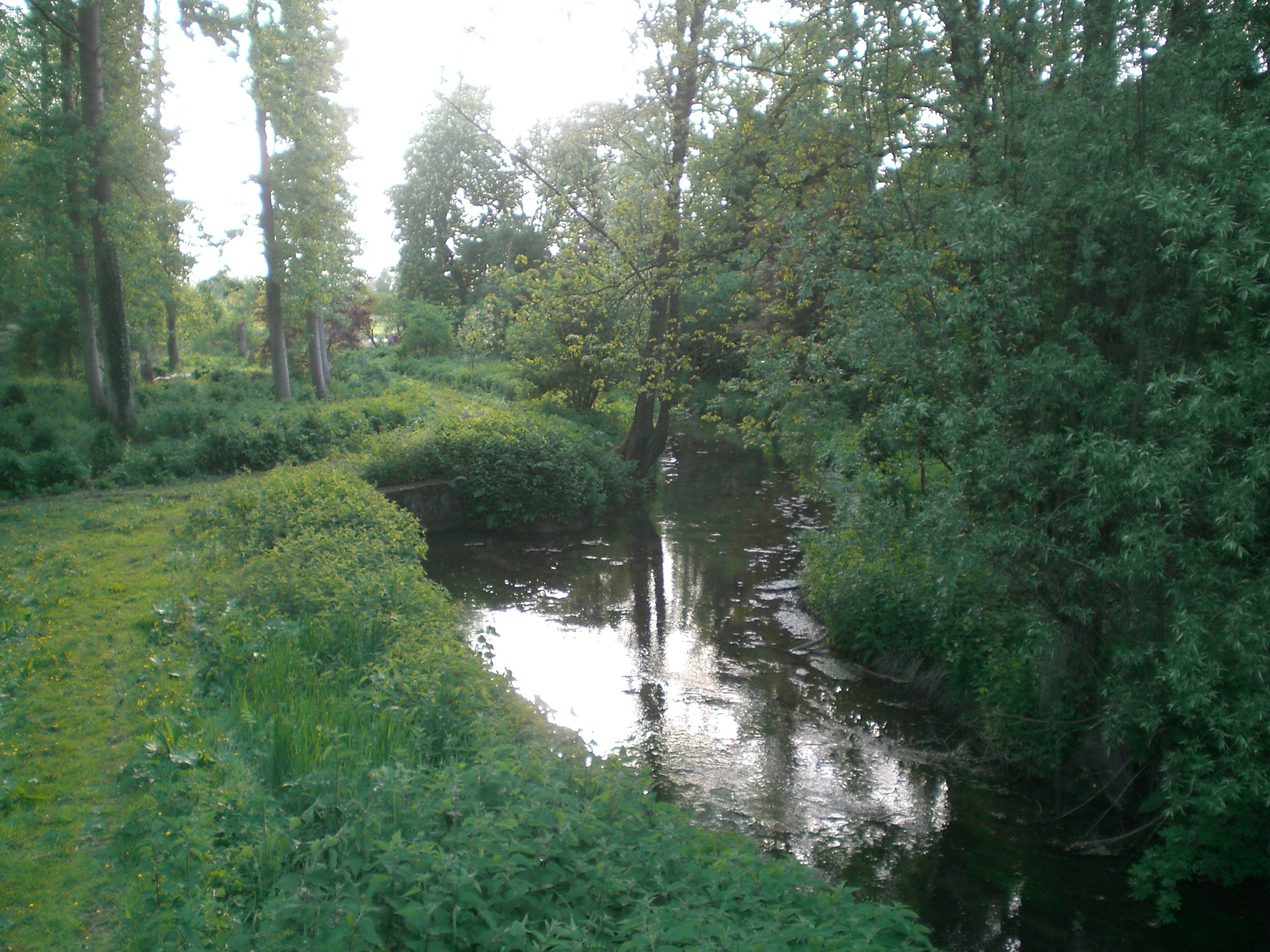 La Germaine à Sancourt en mai 2010